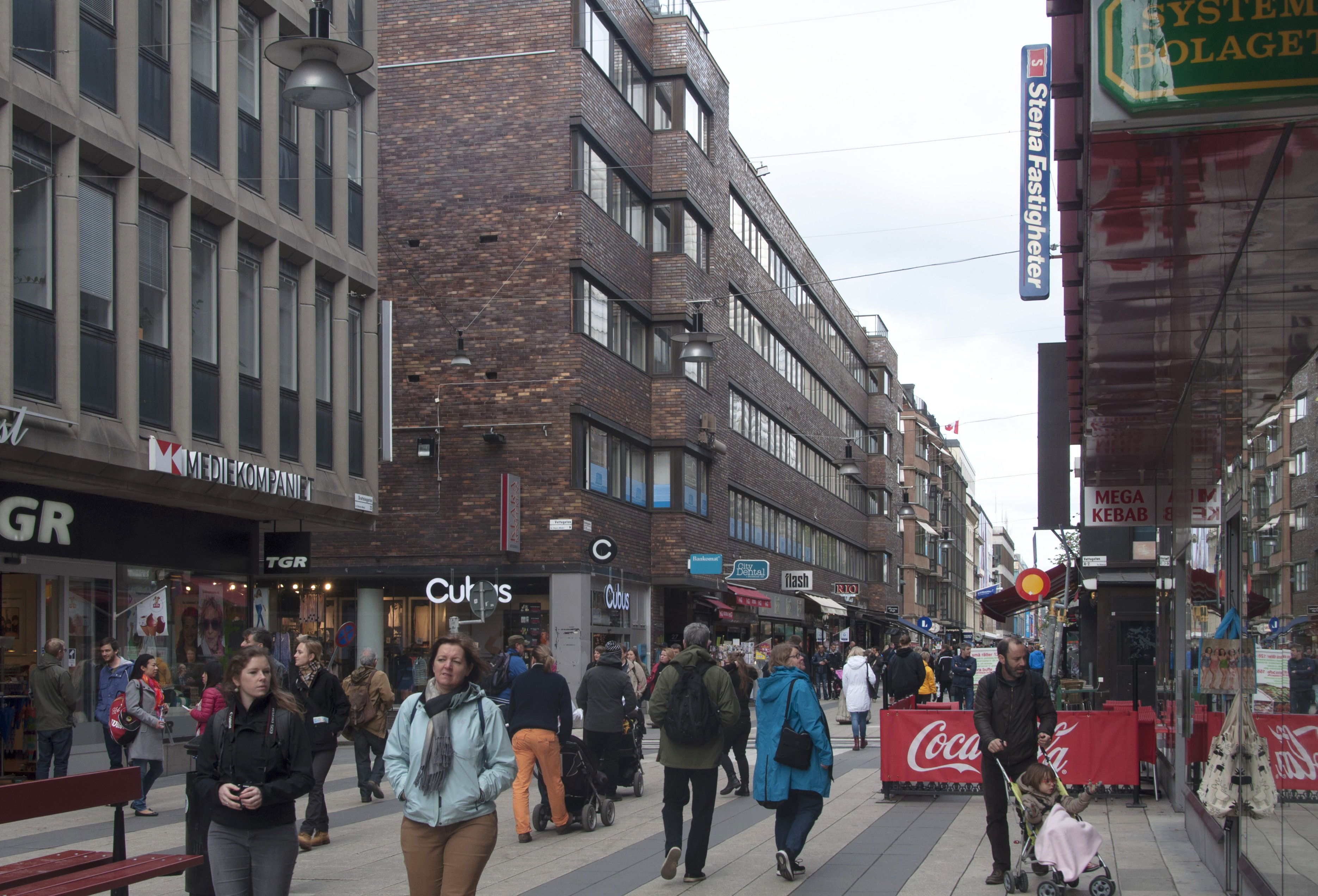 Sparbankernas hus, Hägern mindre 7, Drottninggatan 27-29, Nybyggnadsår 1967 - 1978, Boijsen & Efvergren Arkitektkontor AB (Arkitektkontor) Byggnadsfirman Nils Nessen AB (Byggmästare) Gunnar Martinsson Trädgårdsarkitektkontor AB (Trädgårdsarkitekt) Karin Björqvist (Konstnär) Stockholms stads fastighetskontor, saneringavdelningen (Byggherre) Sven Tyrén AB (Konstruktör)